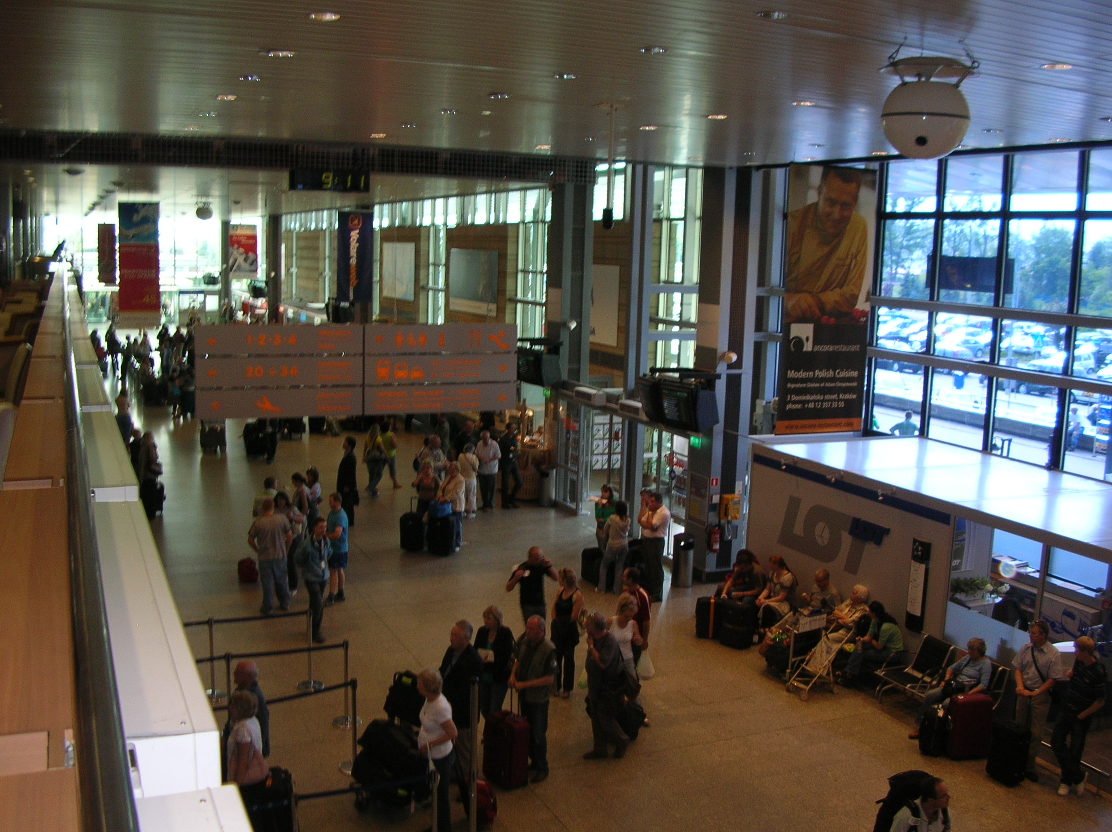 Wnętrze Krakowskiego portu lotniczego